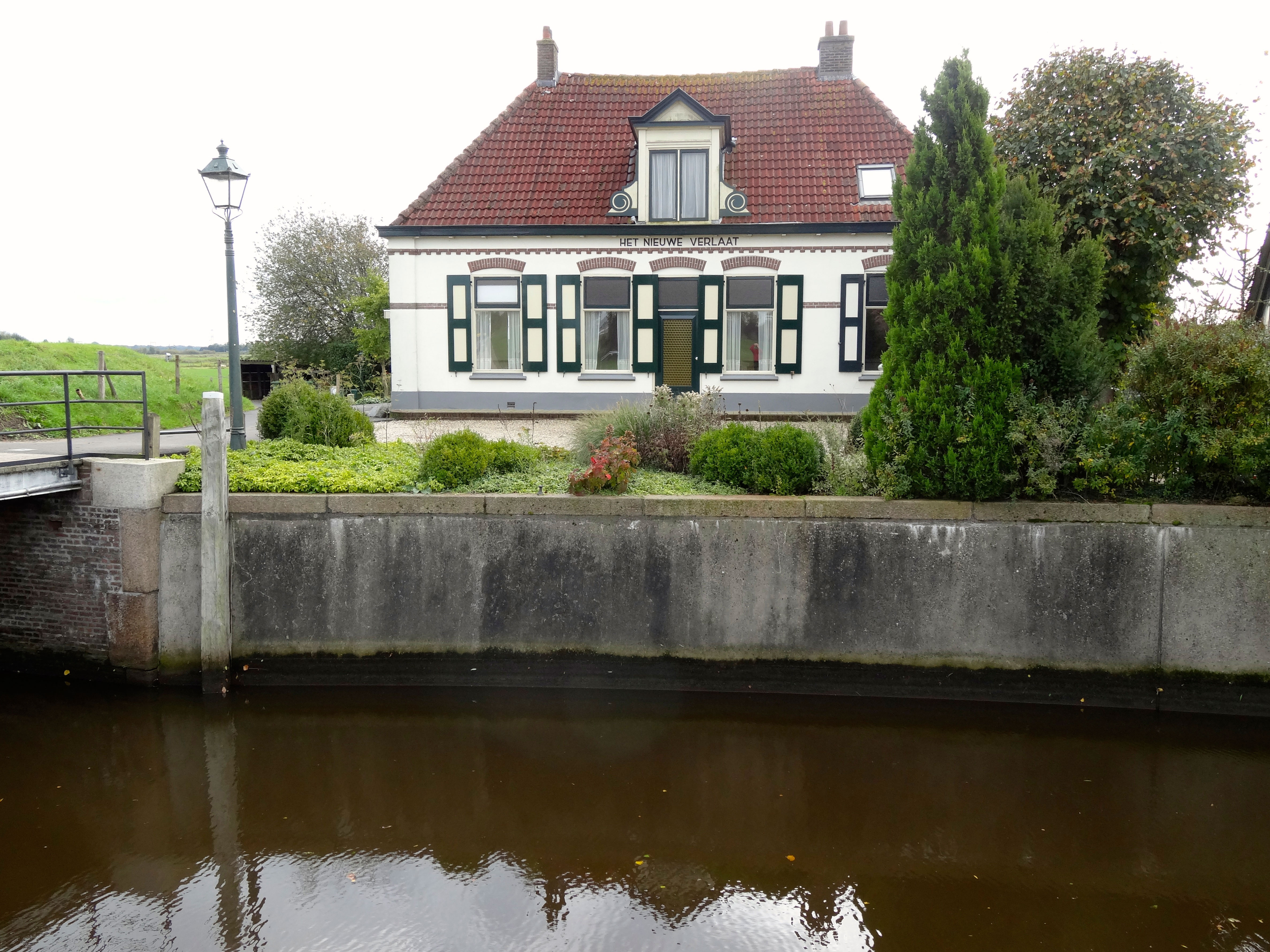 Het Nieuwe Verlaat in de Nieuwe Vecht ten zuidoosten van de wijk Berkum in Zwolle